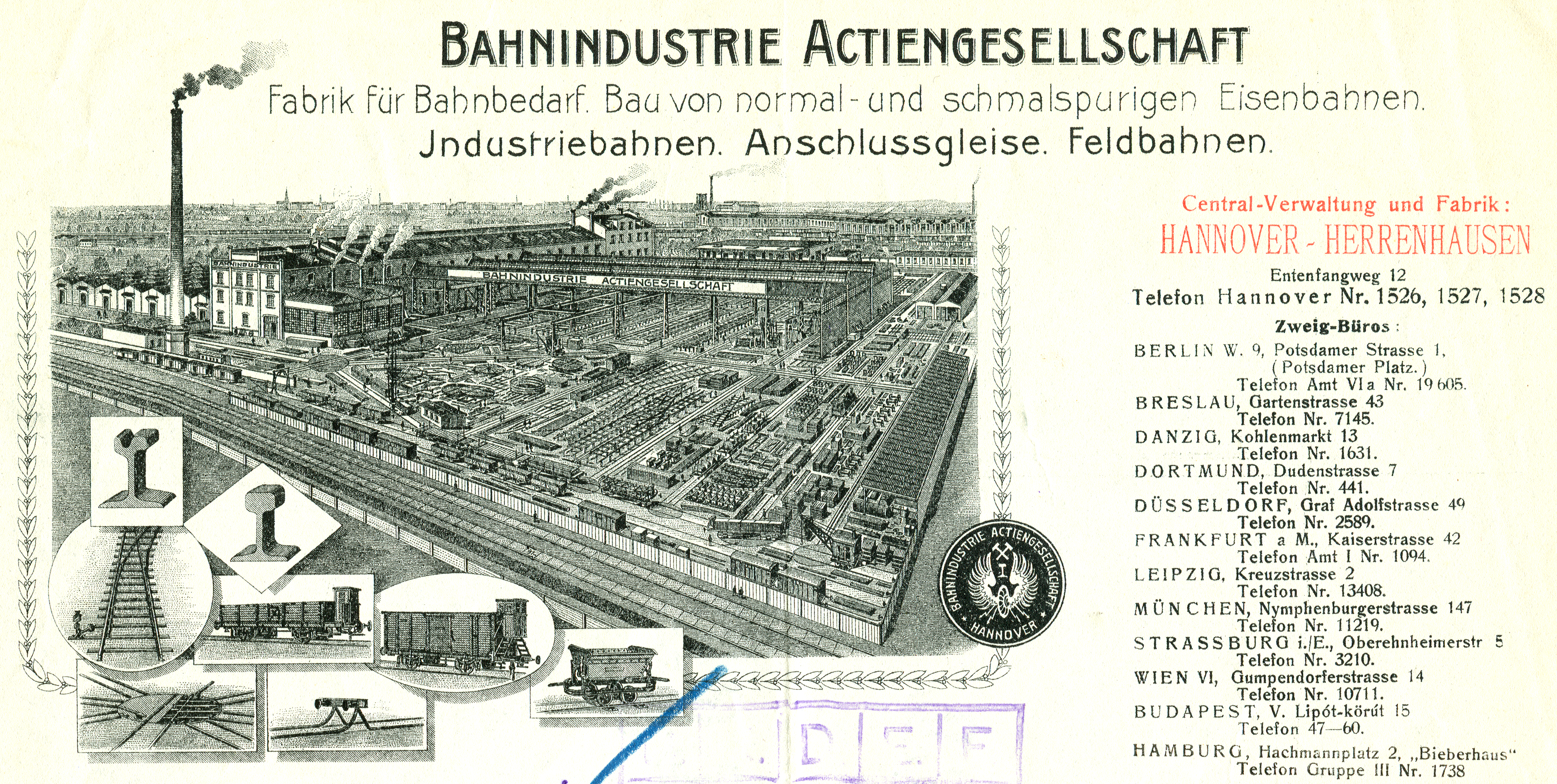 Details in einem Brief-Kopf der Bahnindustrie AG, Vogelschau Ansicht über die "Central-Verwaltung und Fabrik am Entenfangweg 12 in Hannover-Herrenhausen mit Gebäuden, Firmengelände, Eisenbahn-Gleisen und nähere Umgebung ...